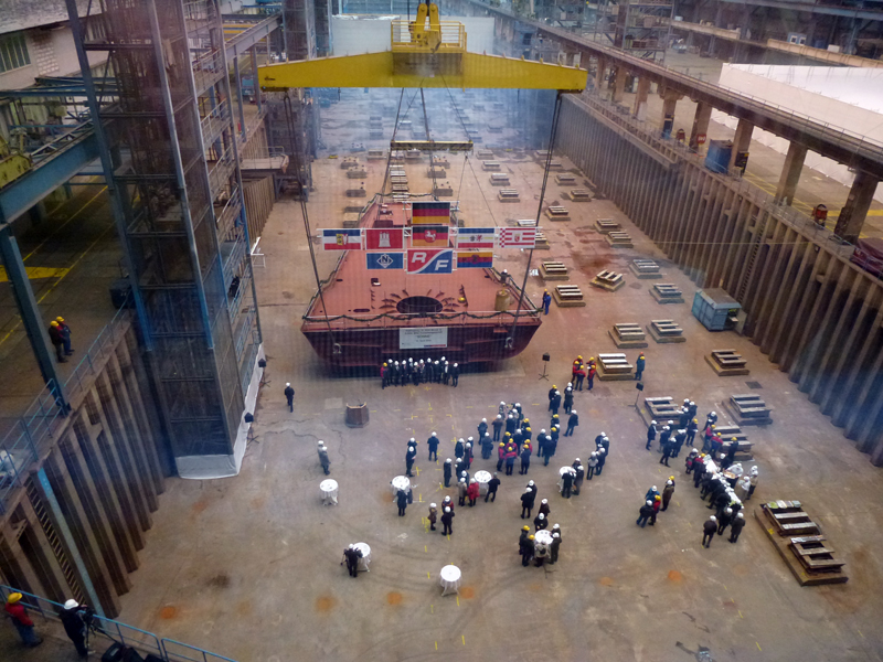 Kiellegung des Forschungschiffes Sonne 2015